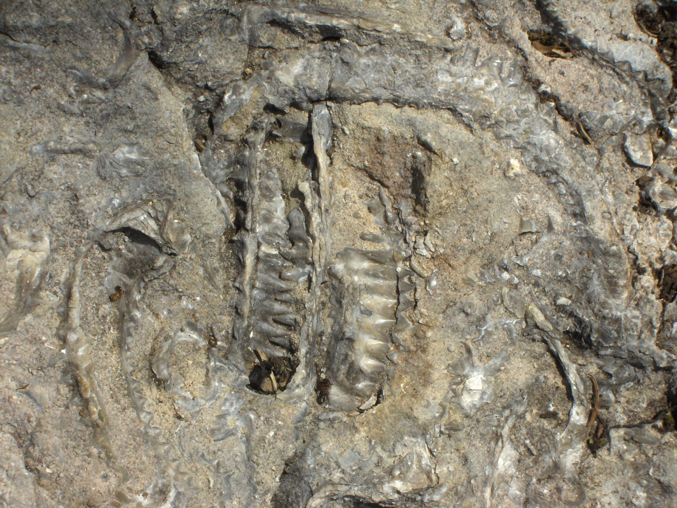 Fossile d'huitre sur le GR 91 vers la cabane de Tiolache du Milieu.